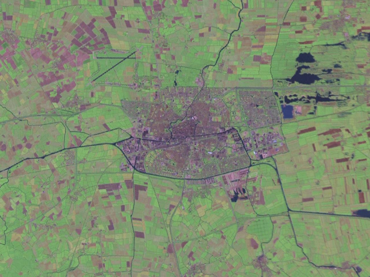 Leeuwarden satellietfoto.